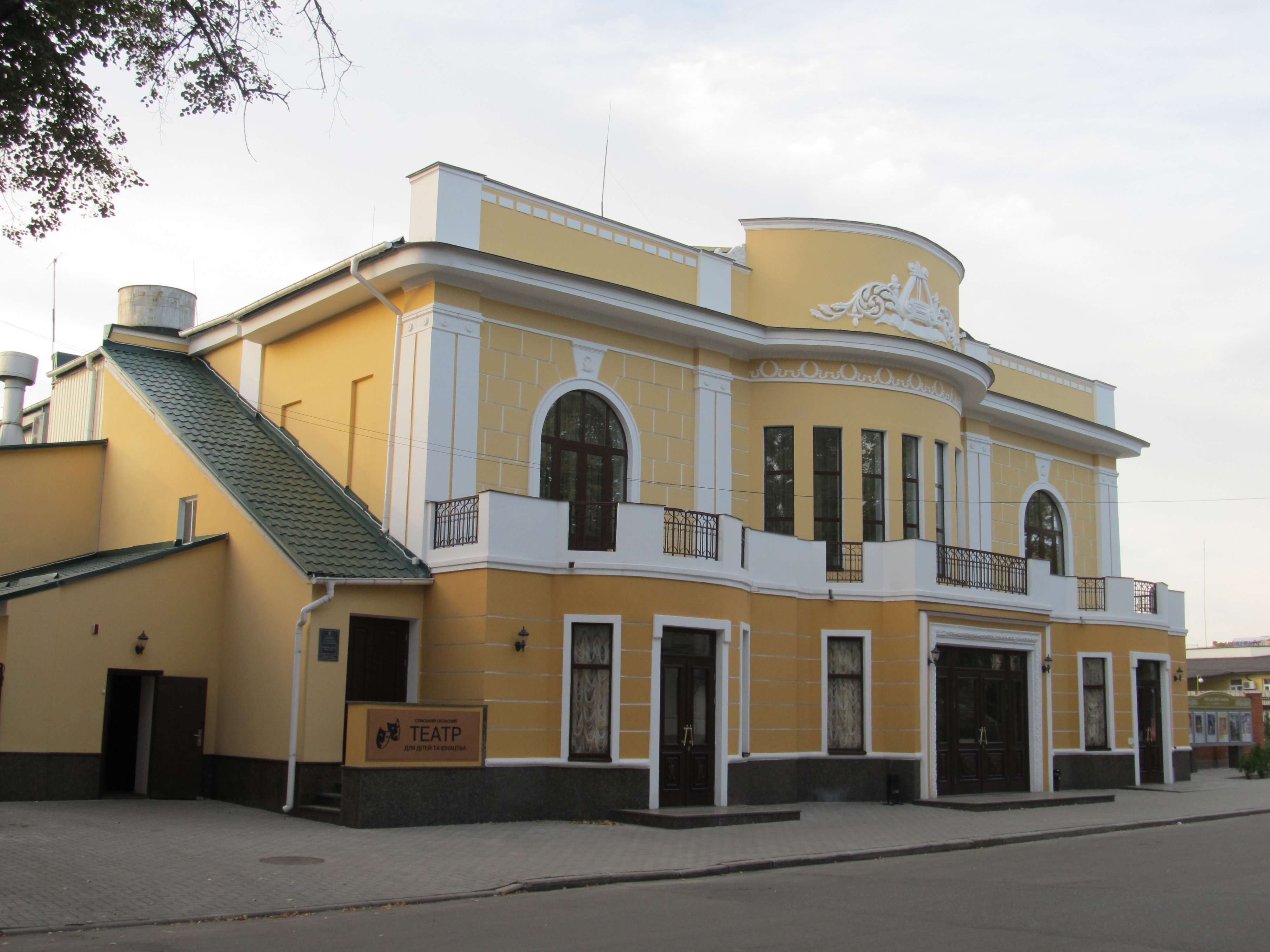 Міський театр у Сумах. Нині - театр юного глядача